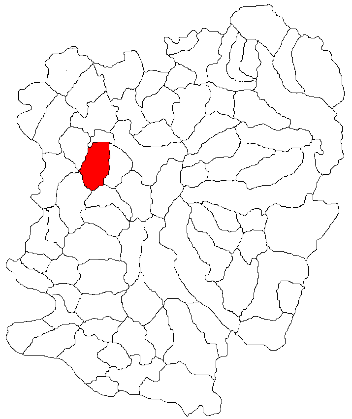 Categorie:Hărţi ale judeţului Caraş-Severin